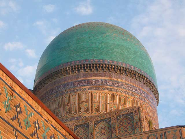 Bibi-Khanym Mosque